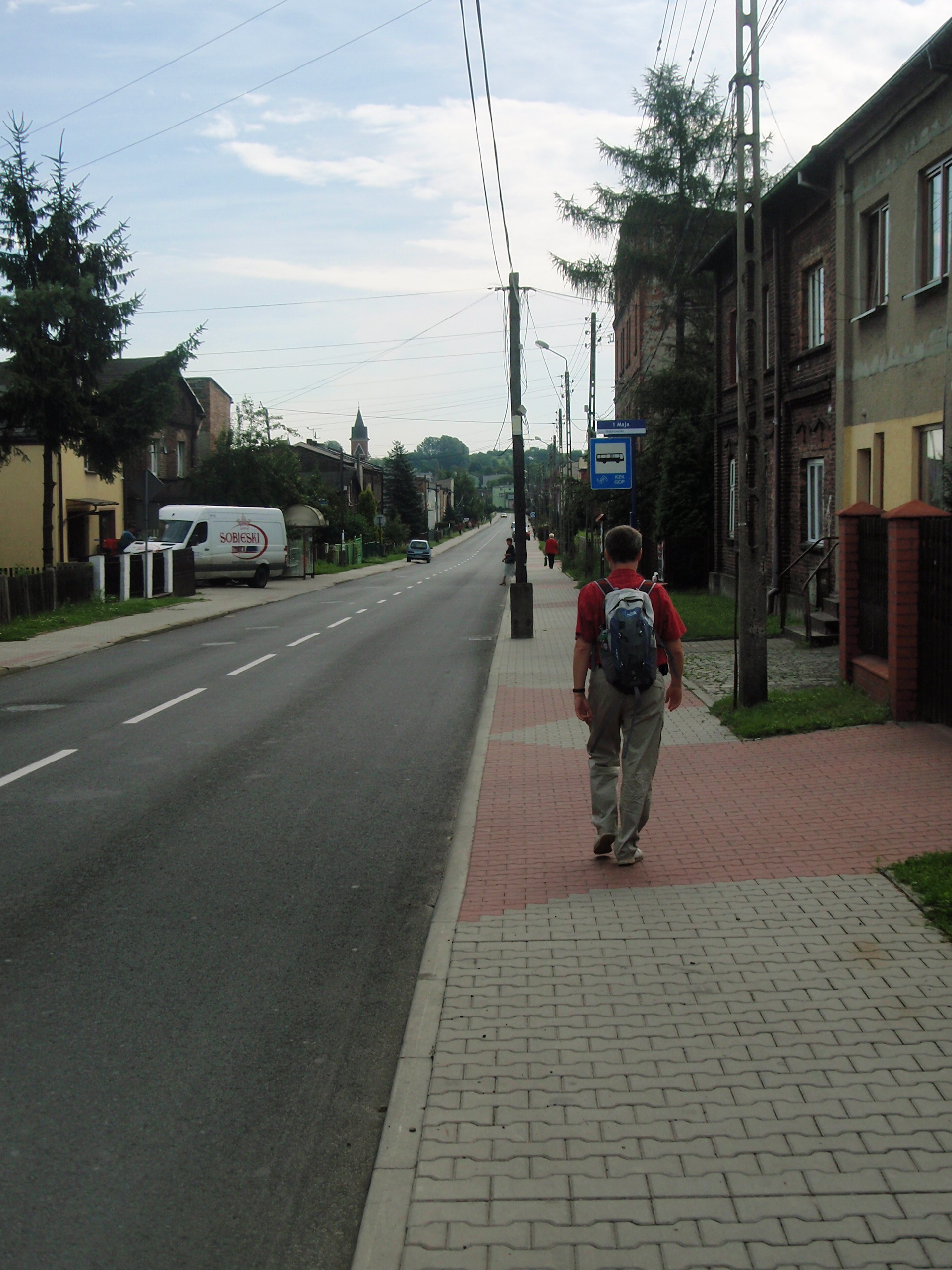 Bobrowniki (powiat będziński)